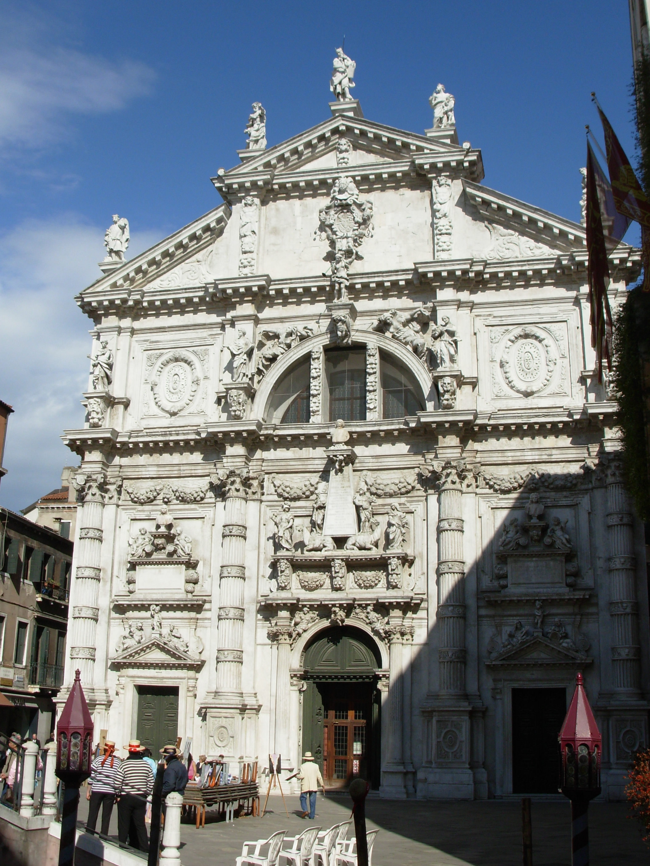 Venezia - Chiesa di S.Moisè